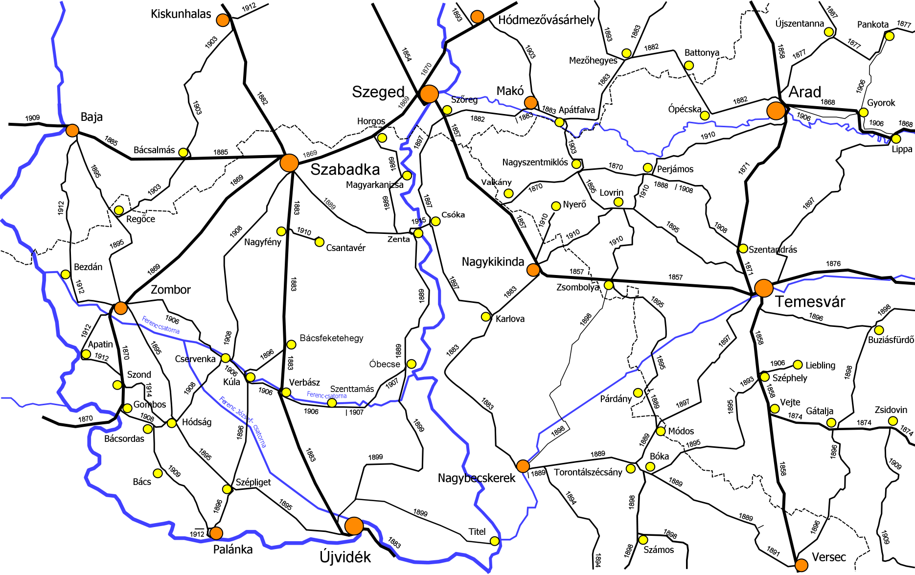 Bácska vasútjai (1920-as állapot)